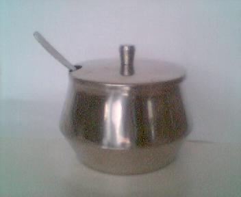 Een suikerpot